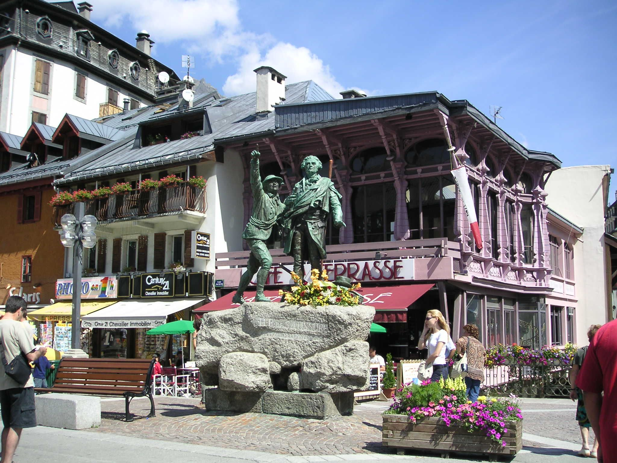 Statue de Balmat et Saussure. Chamonix, France